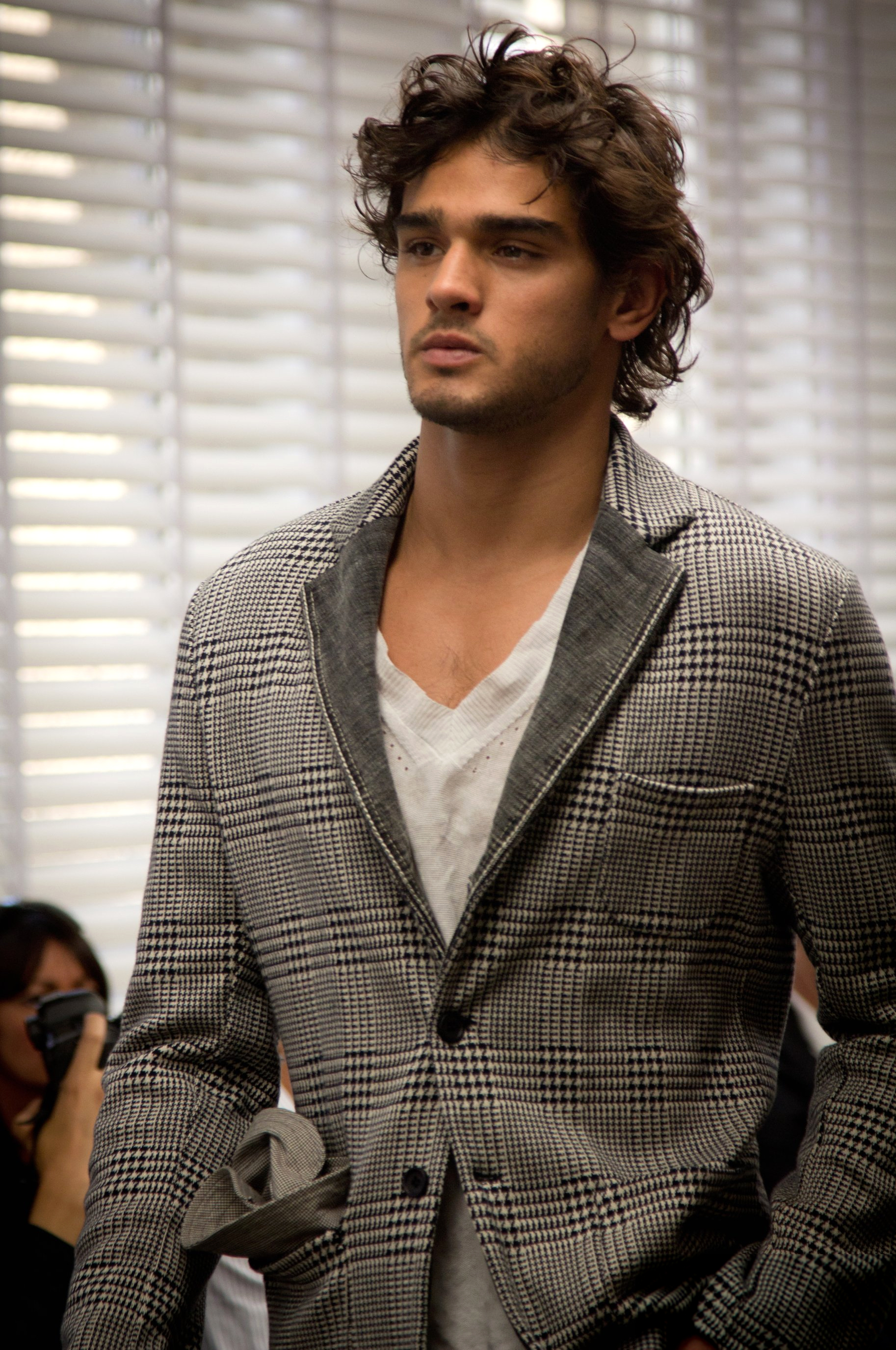 Marlon Teixeira @Ermanno Scervino